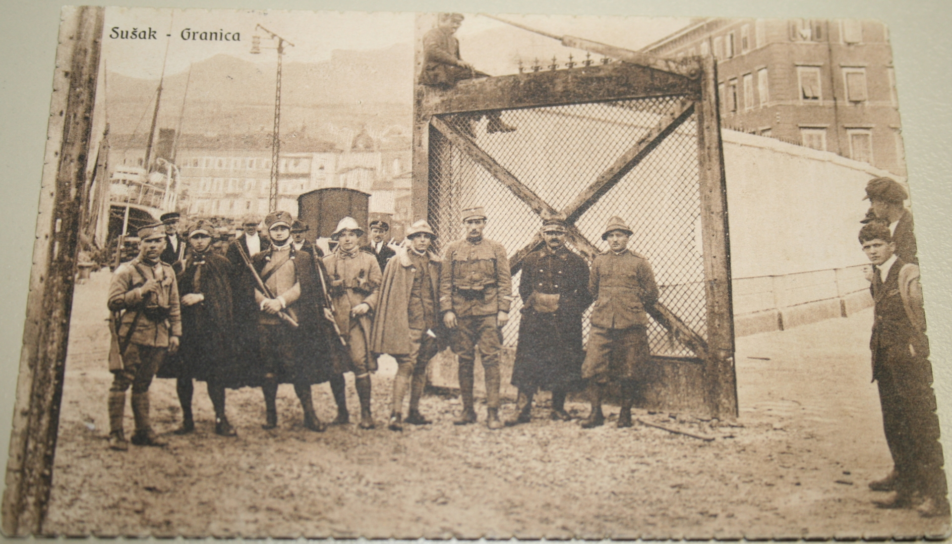 Rijeka - Sušak granica 1929. godine